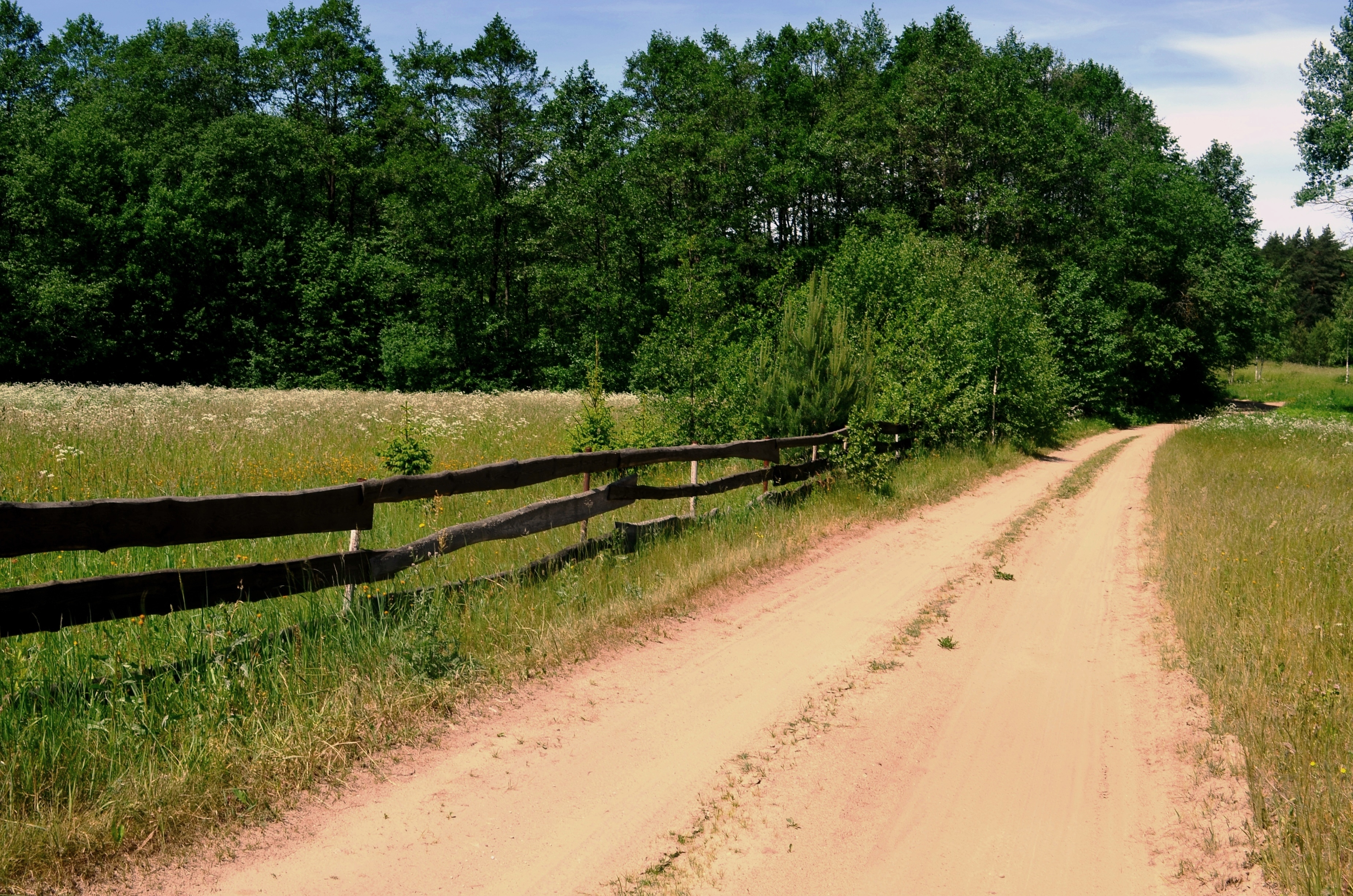 Senovinė medinė lauko tvora, Stankai, Vilniaus raj.